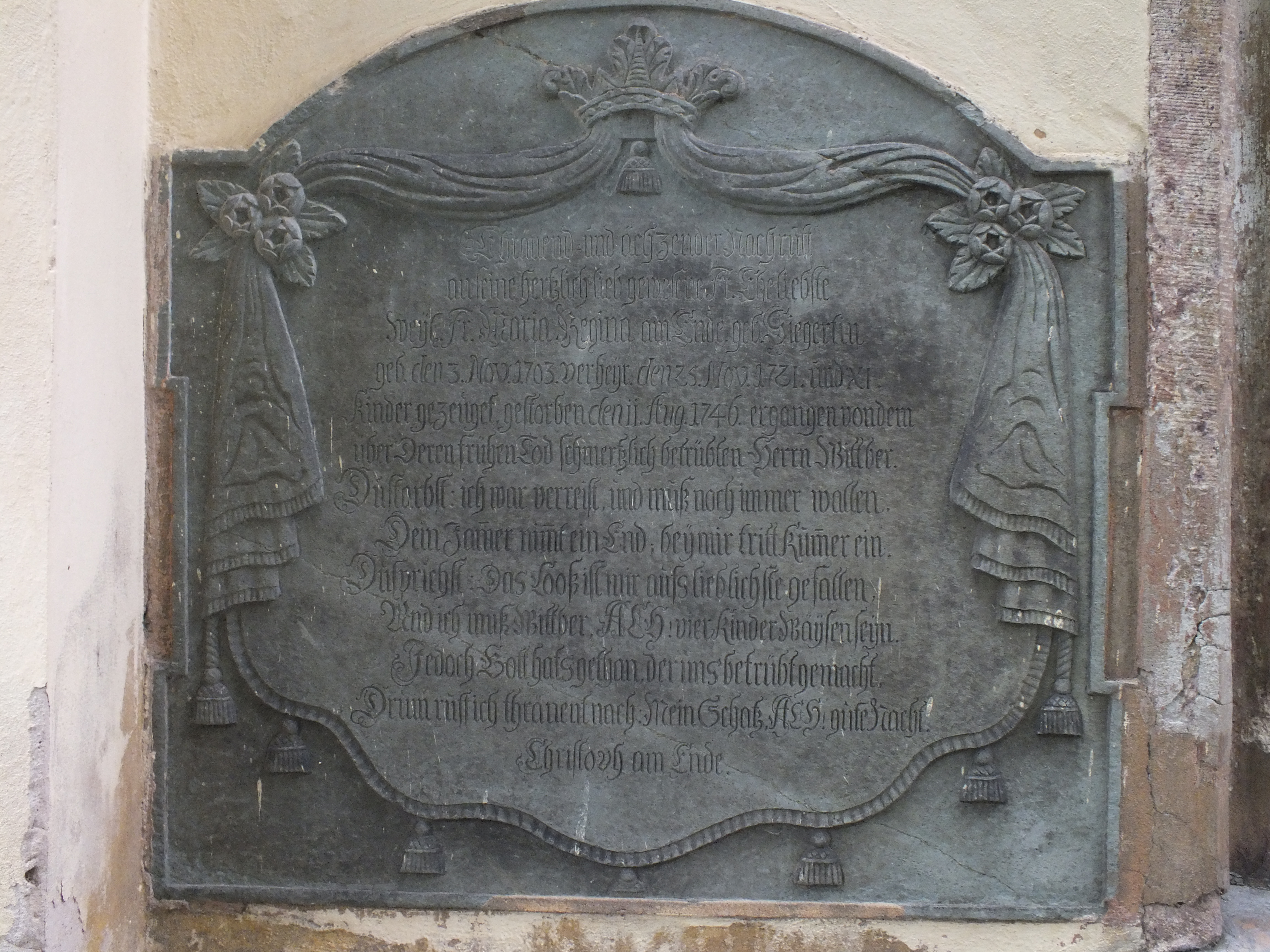 Hospitalkirche St. Georg Lößnitz